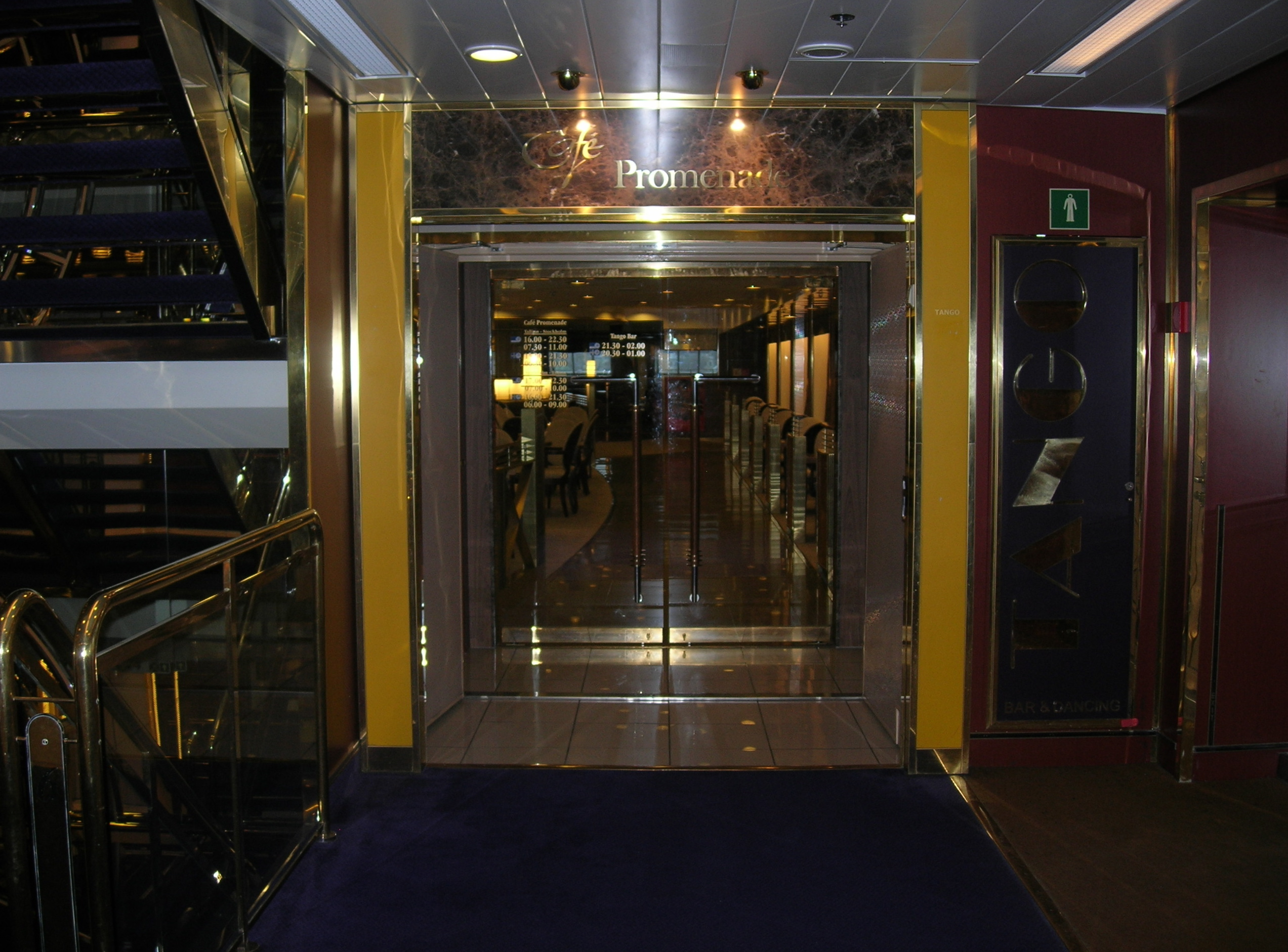 Tallink